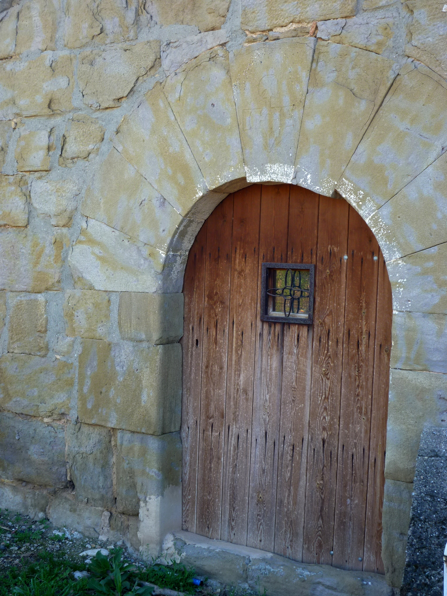 Capella de Sant Joan (la Baronia de Rialb): portalada